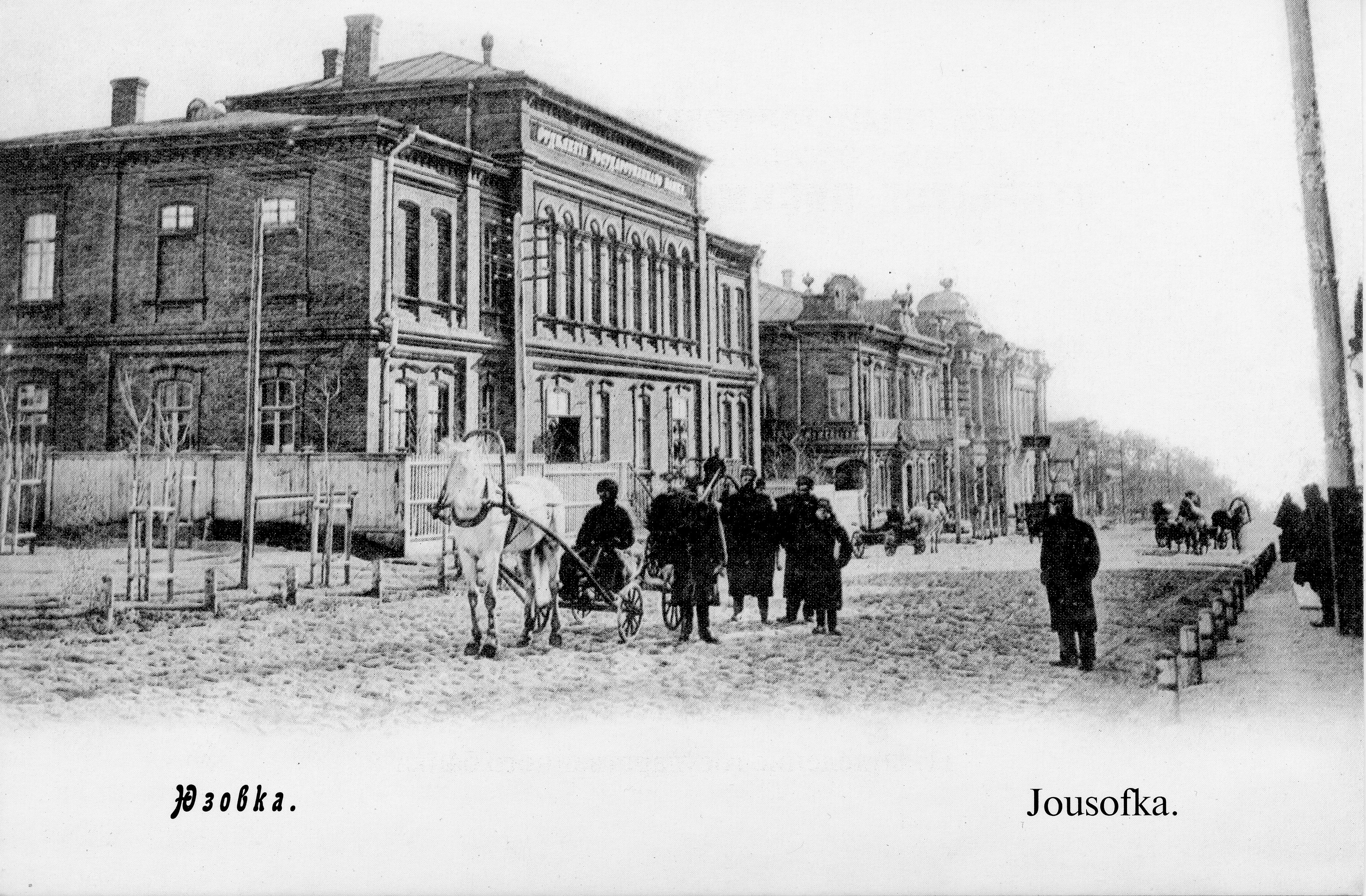 Дореволюционная открытка из Юзовки. Отделение государственного банка